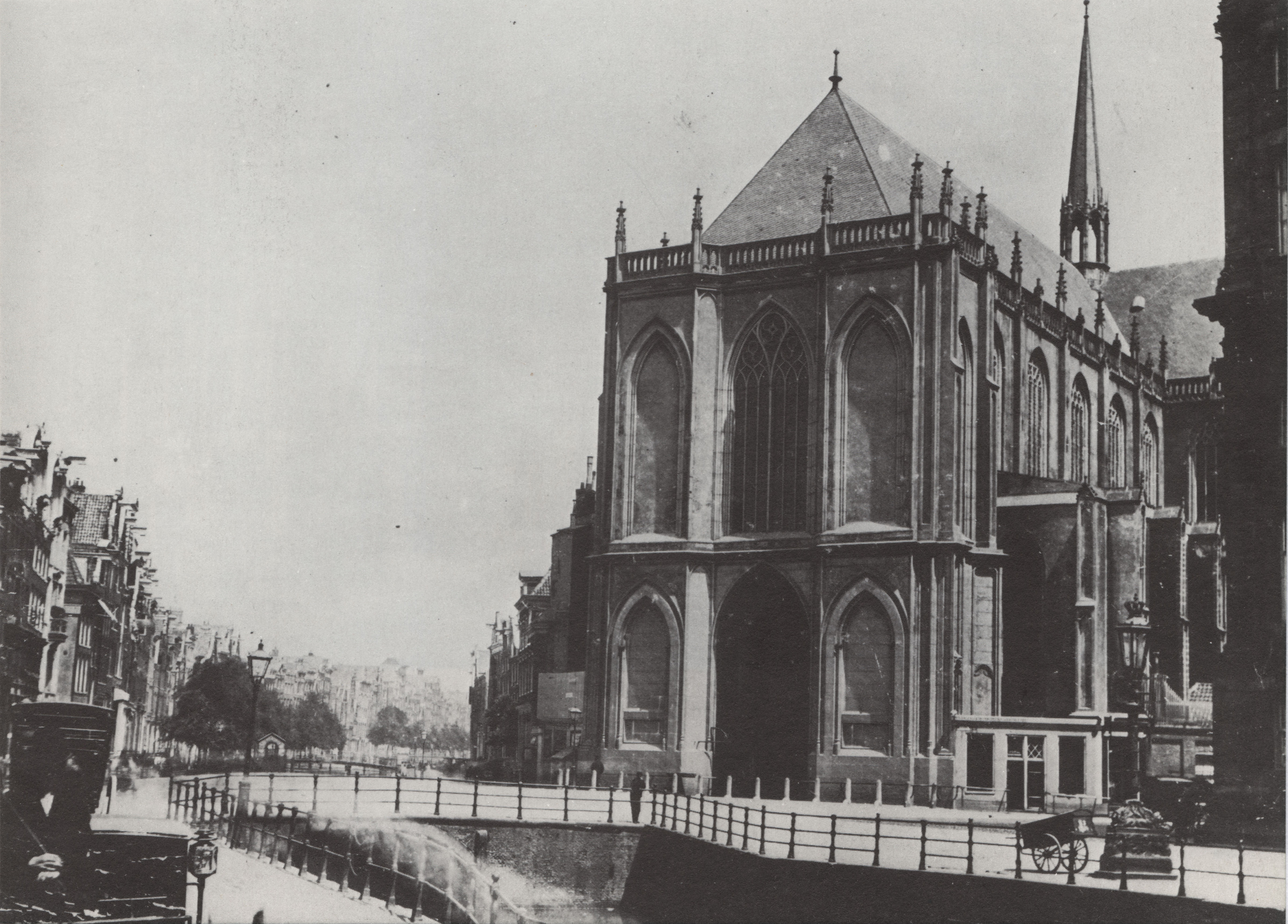 Nieuwezijds Voorburgwal bij de Nieuwe Kerk, rechts begint Paleis op de Dam.